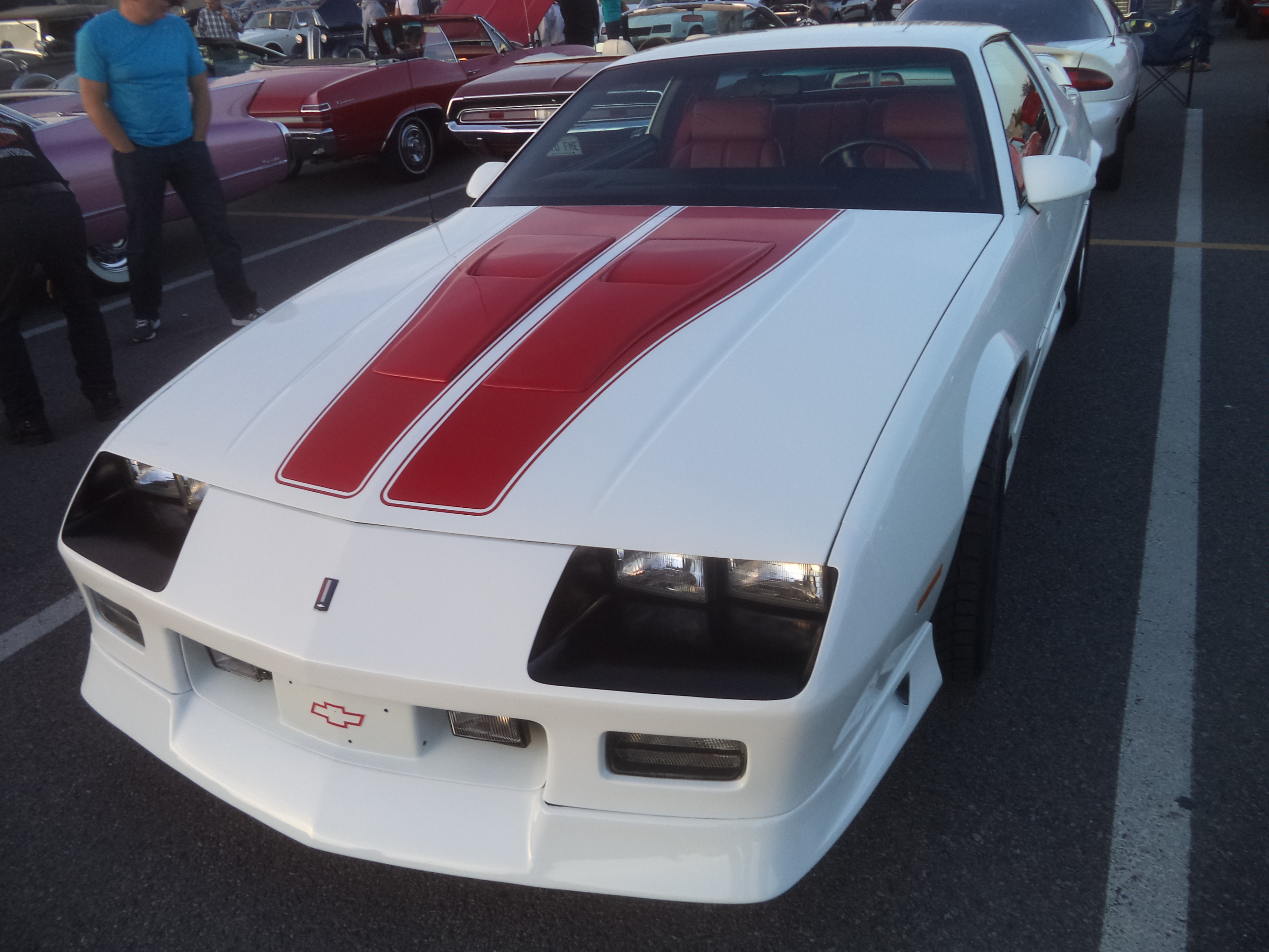 1992 Chevrolet Camaro Z28 25eme anniversaire